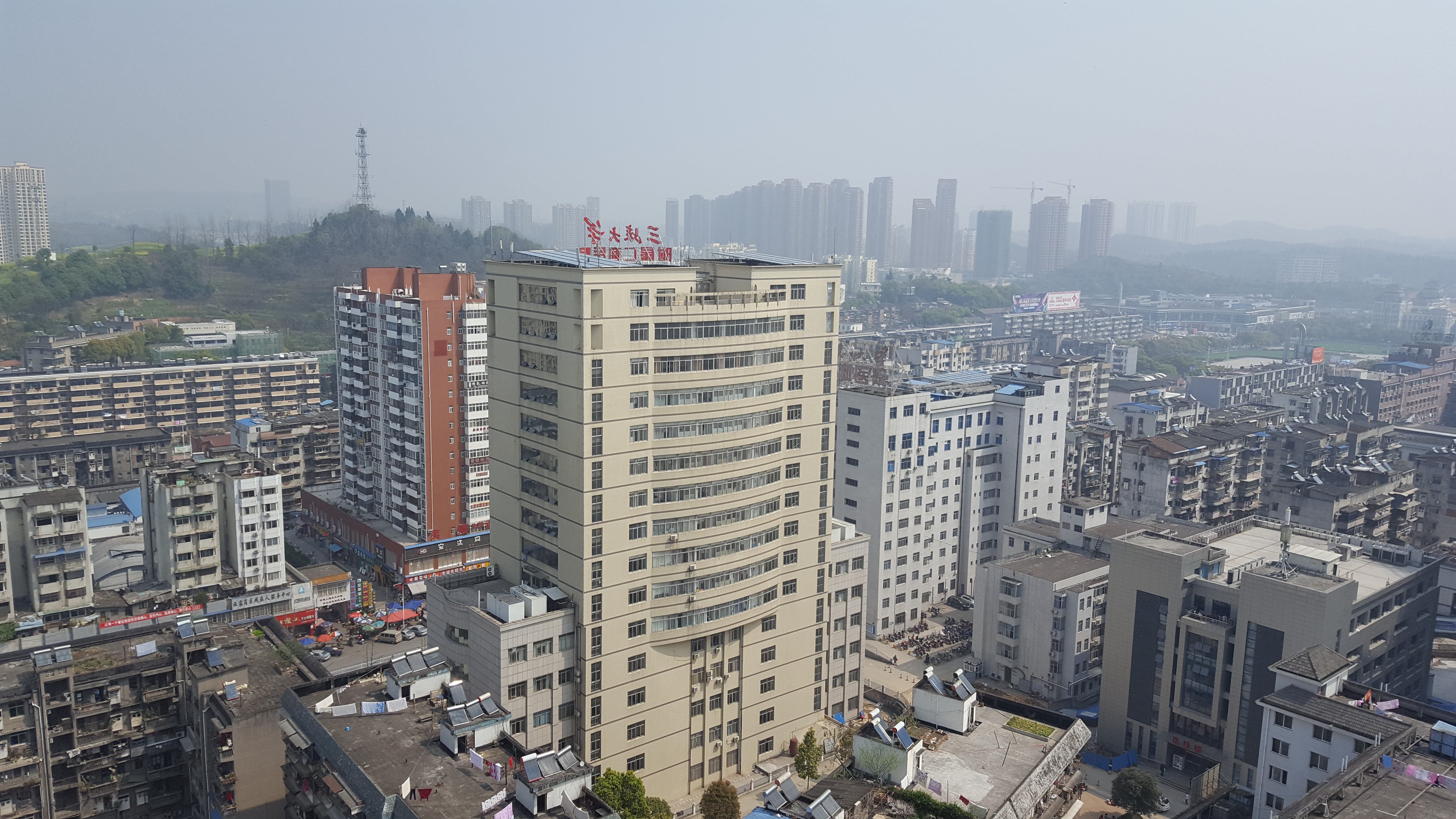 中文（中国大陆）: 三峡大学仁和医院